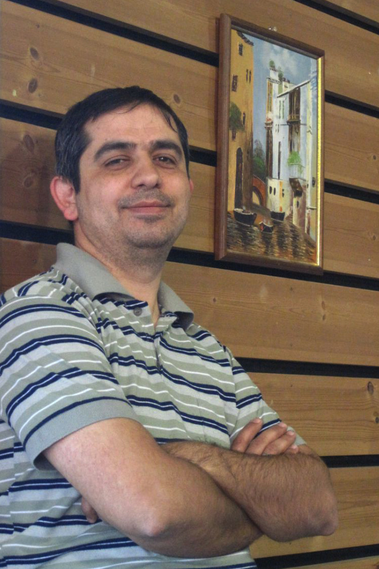 سراج میردامادی در پاریس